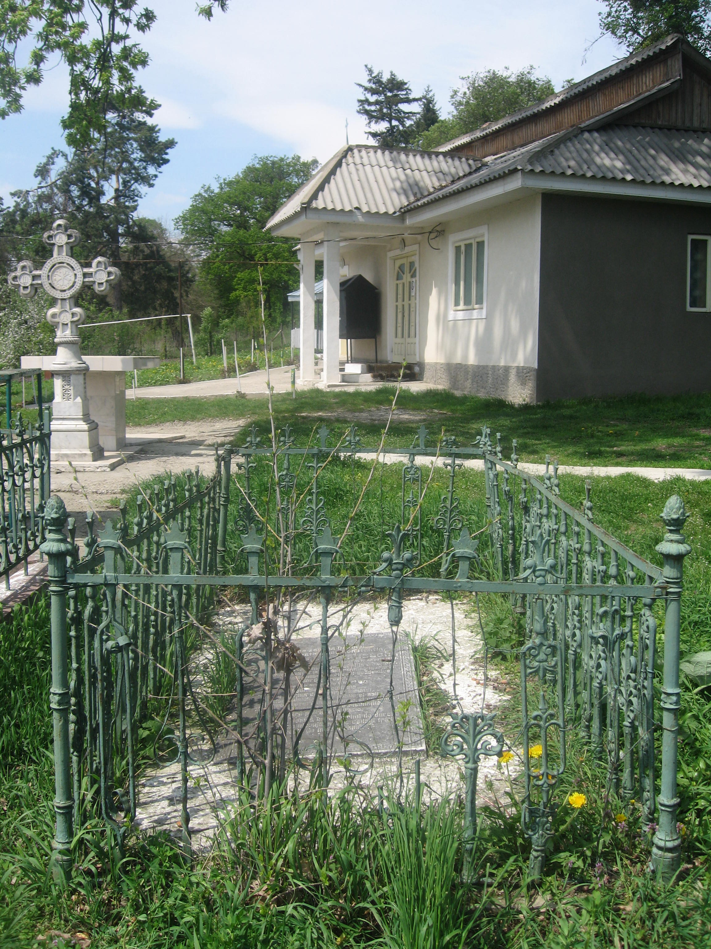 Biserica Pogorarea Sf. Duh din Dulcesti